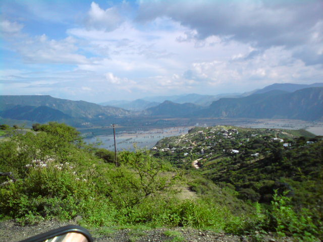 Hualula